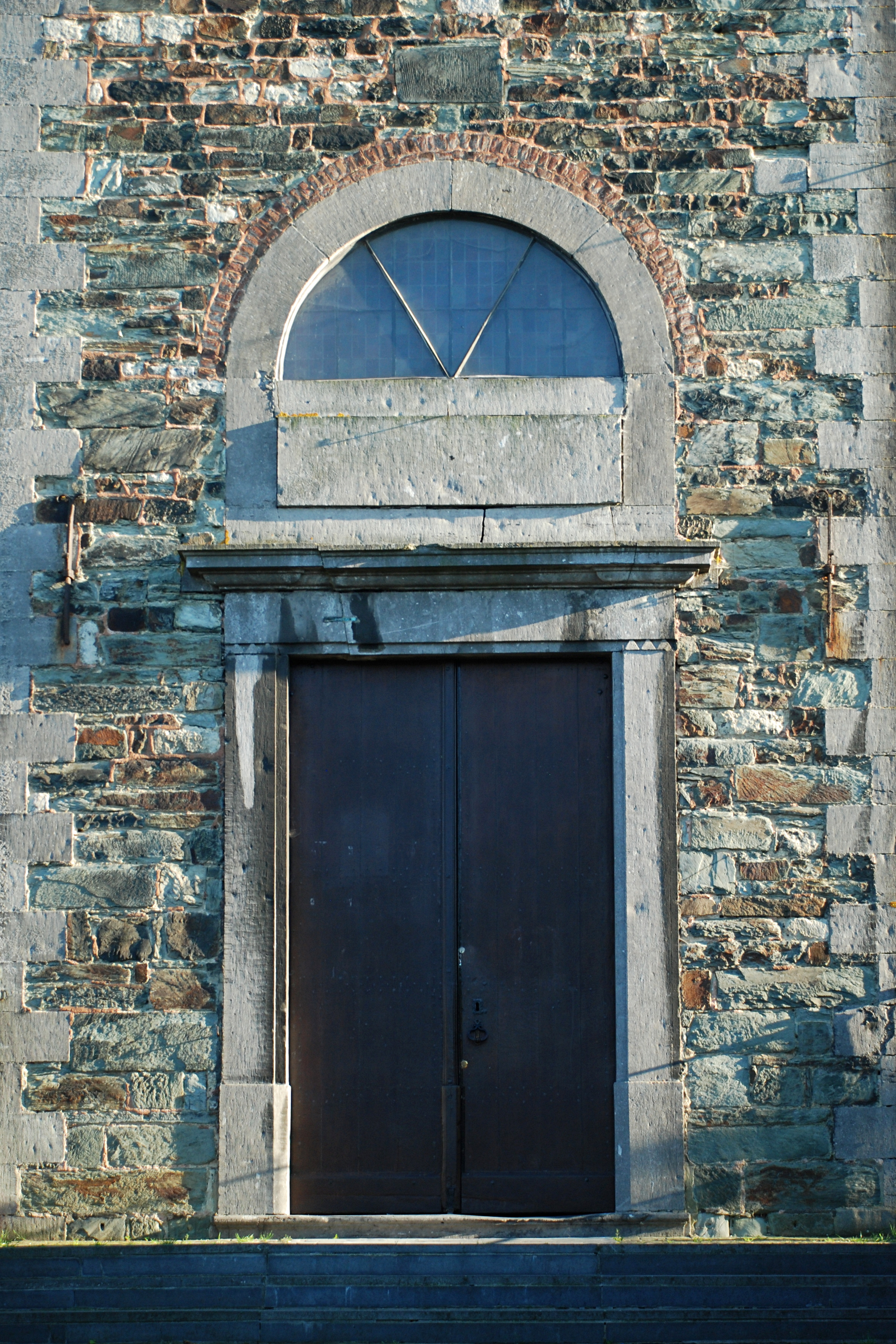 Belgique - Brabant wallon - Mont-Saint-Guibert - Église Saint-Guibert